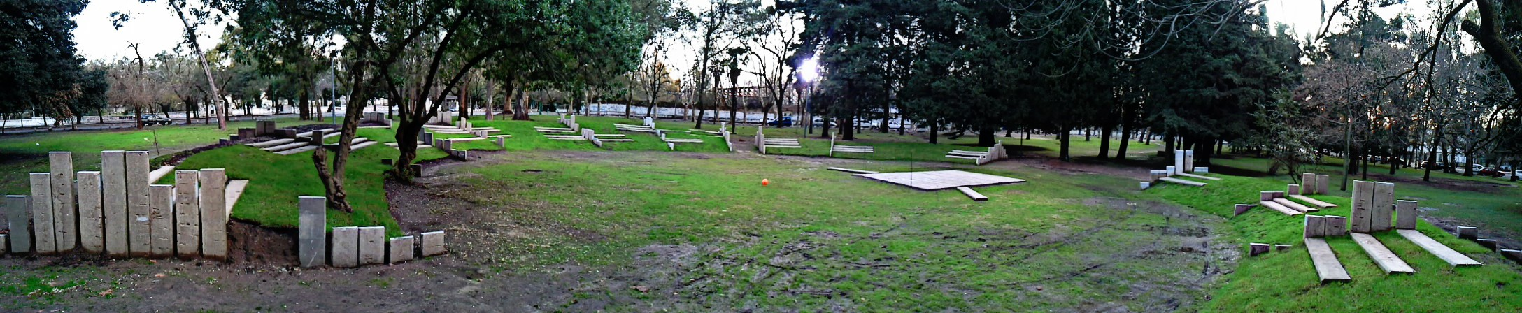 anfiteatro